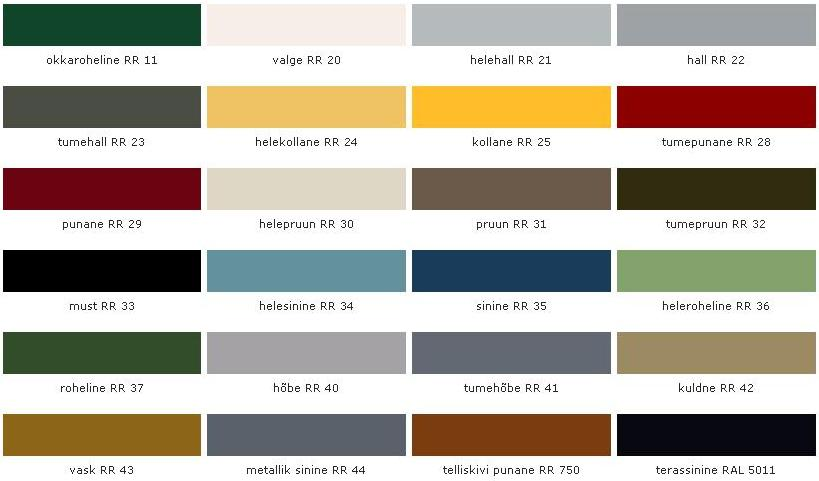 Plekk-katuse 25 erinevat värvi